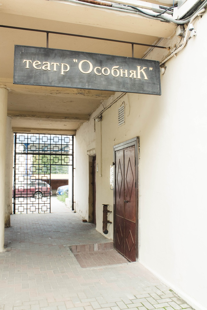 Фоторафия здания нашего театра